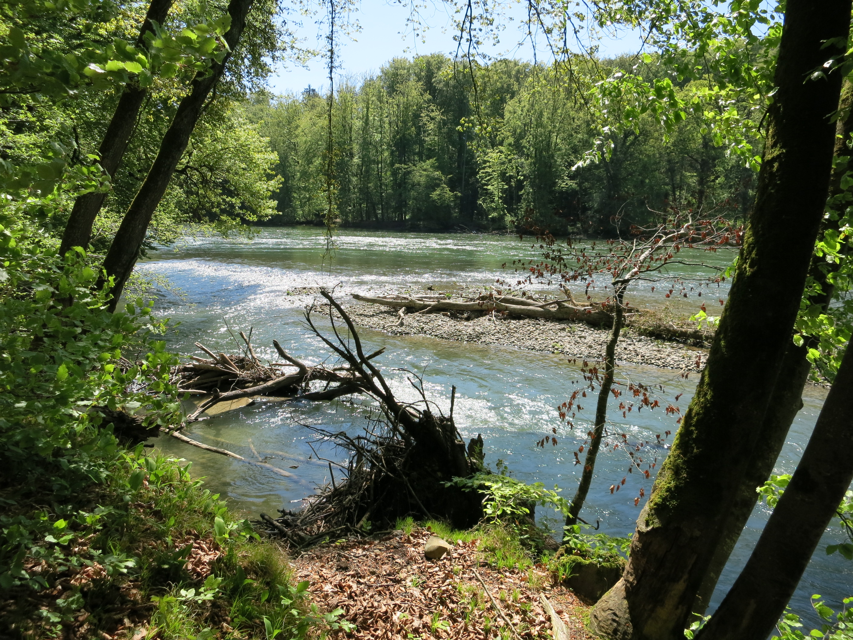 Reuss, Birmenstorf AG, Schweiz